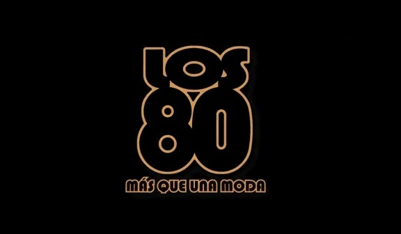 Título de la presentación de la serie Los 80.